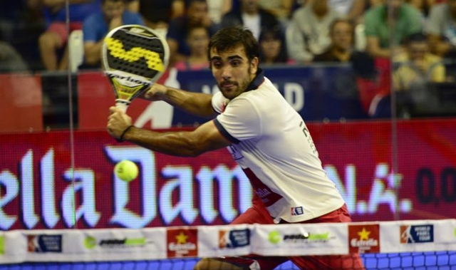 Pablo lima es patrocinado por la marca Varlion